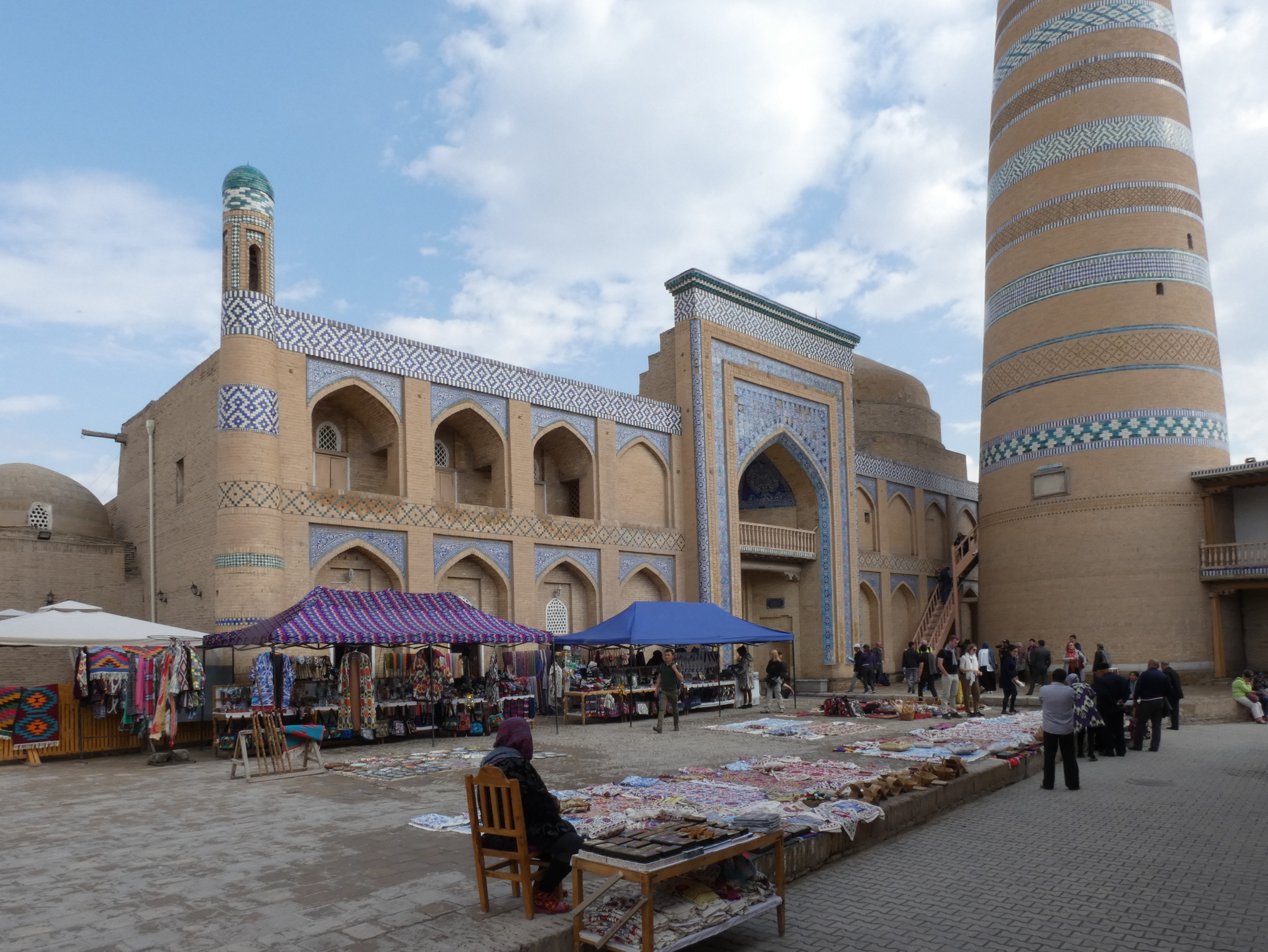 Medrese Islam Khodja, Chiwa